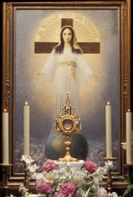 アムステルダムの聖母画像